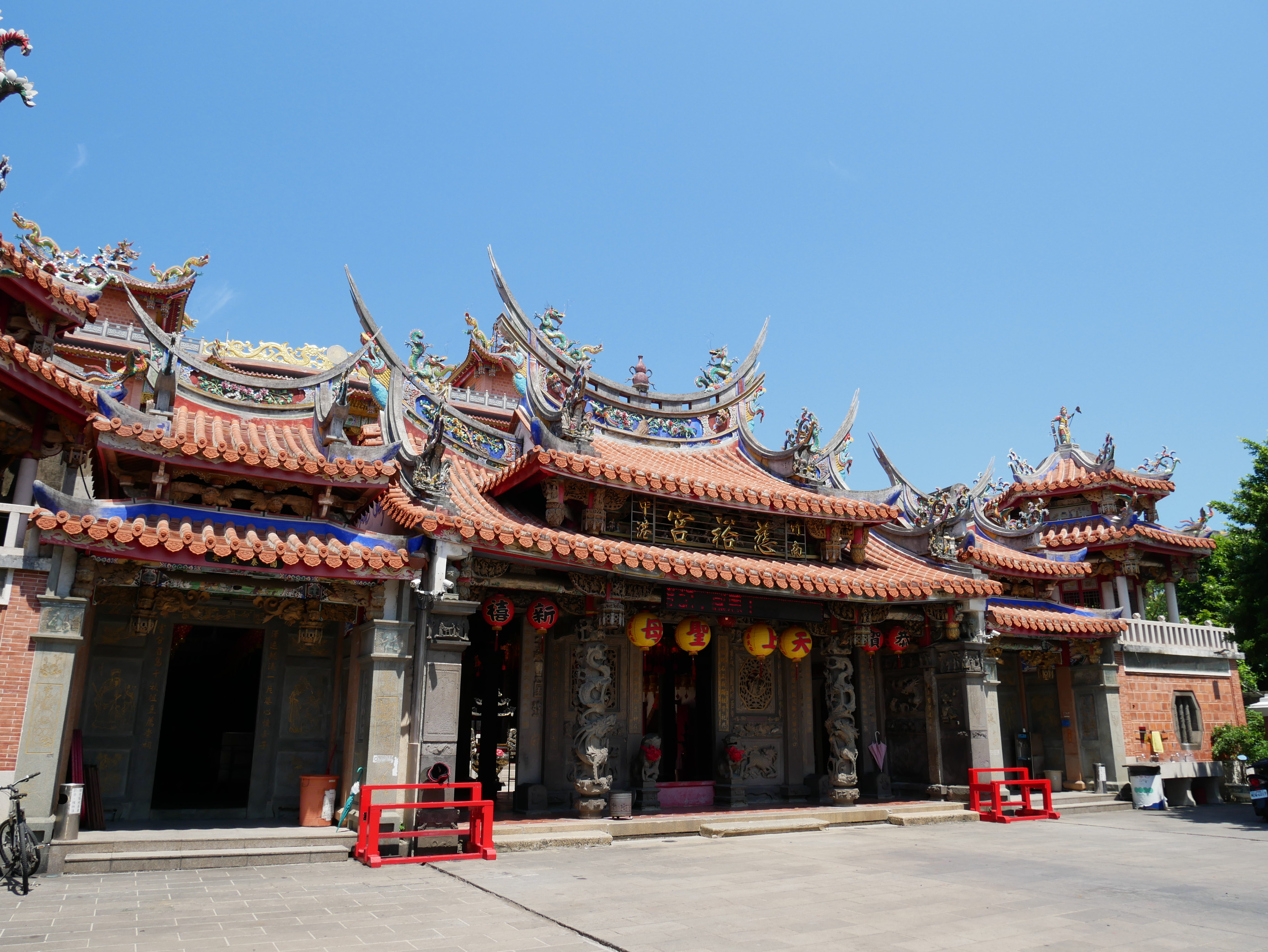 中港慈裕宮近照，苗栗縣竹南鎮中美里